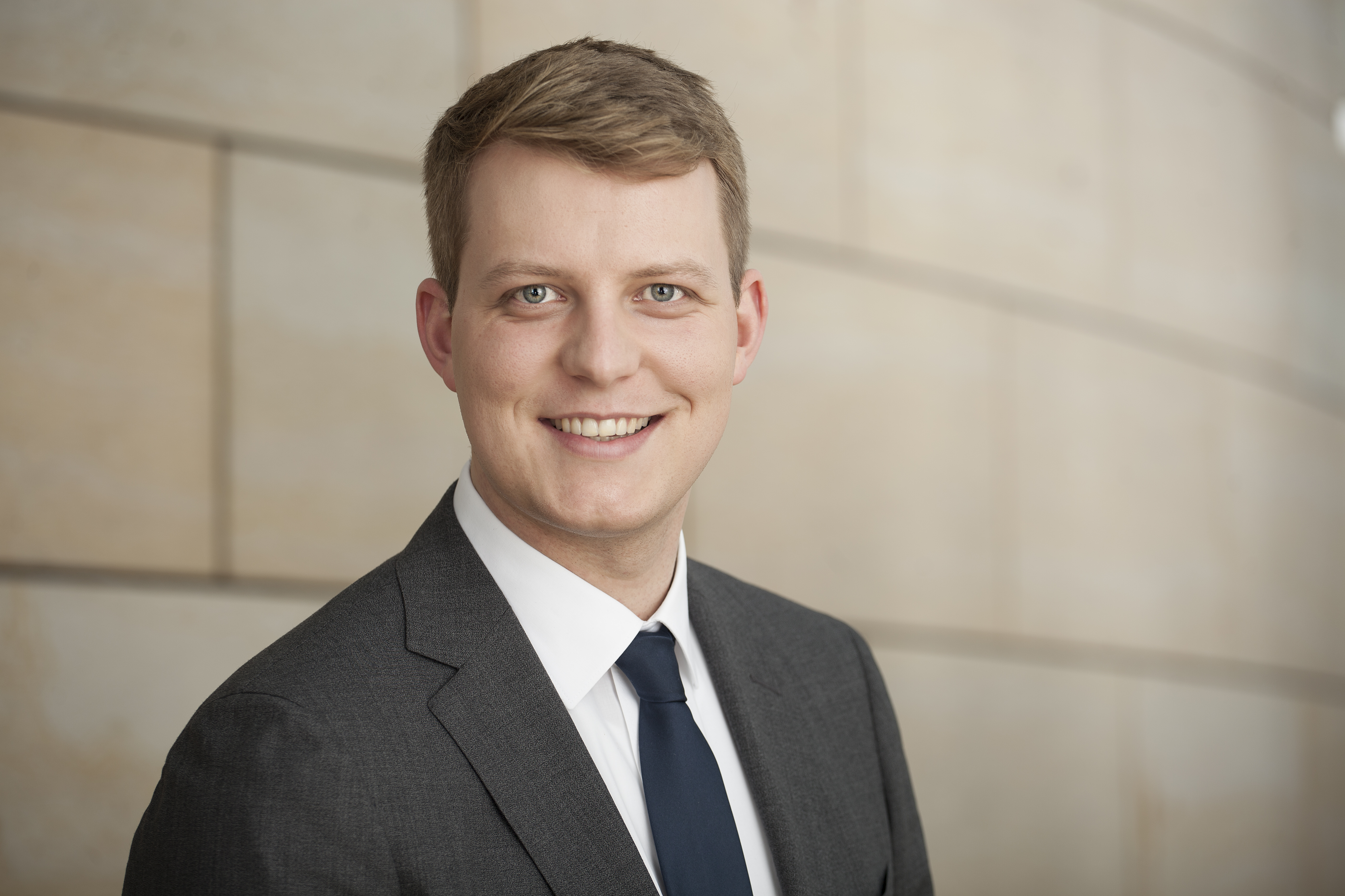 Dies ist ein Portrait von dem nordrhein-westfälischen FDP-Landtagsabgeordneten Henning Höne.